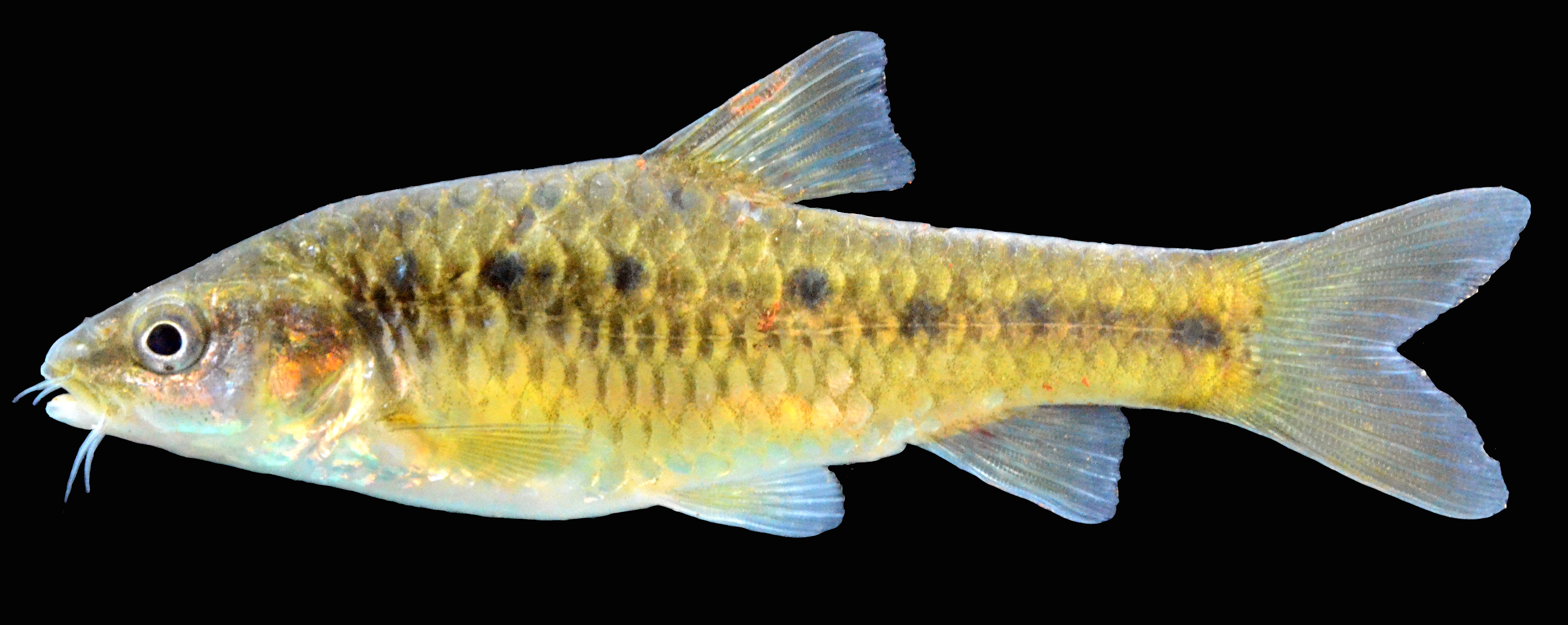 Barbus guineensis AUM 59521